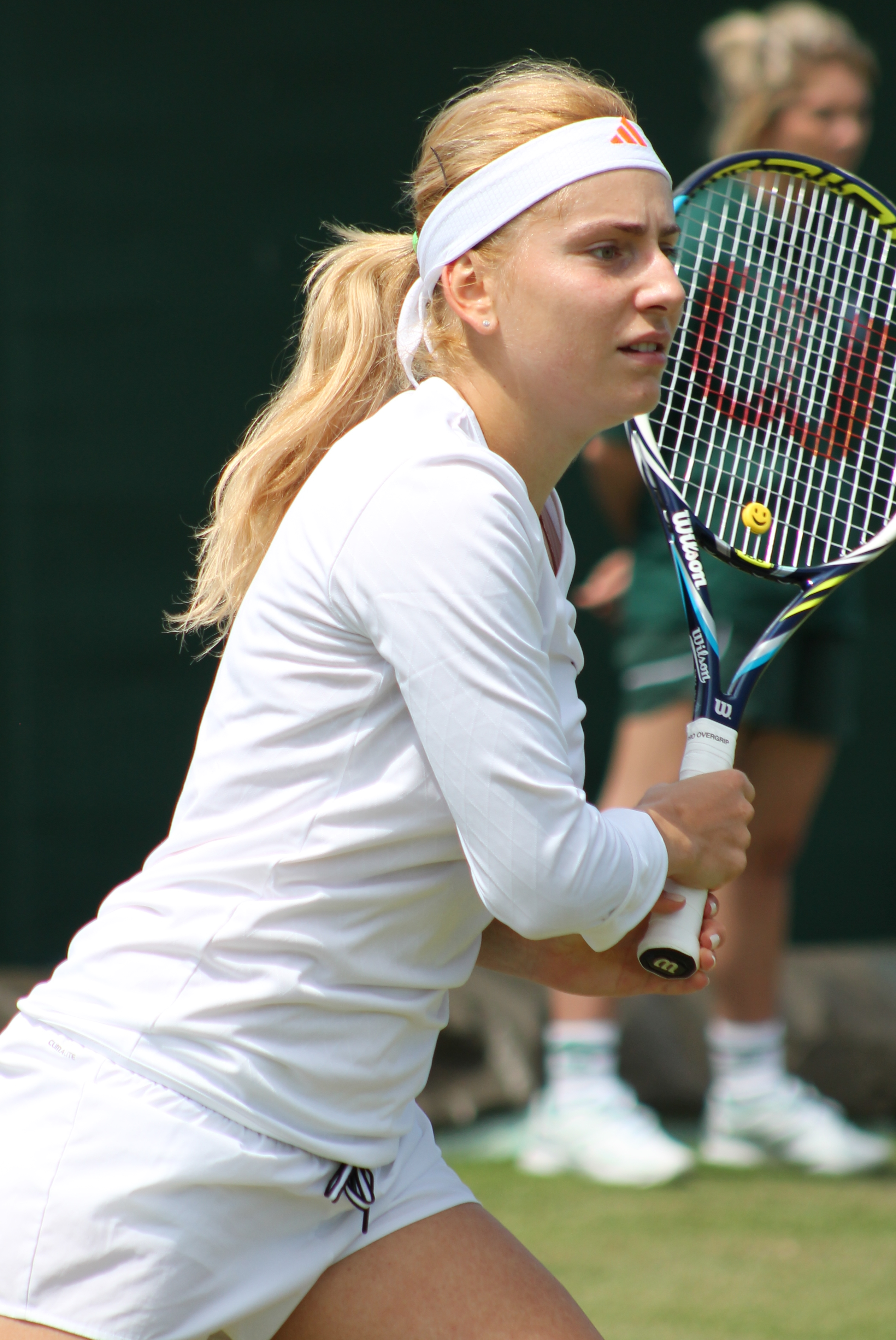 Pervak WMQ14 (13)